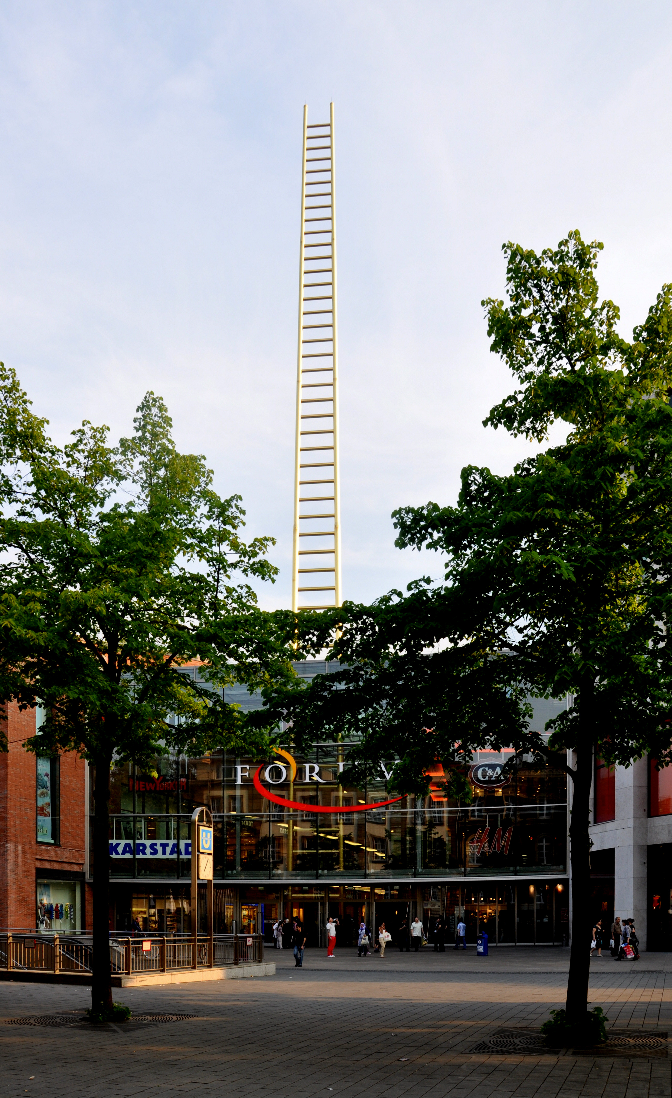 Duisburg, „Forum Duisburg“ mit Skulptur „Goldene Leiter“ von Johannes Brunner und Raimund Ritz (2008)